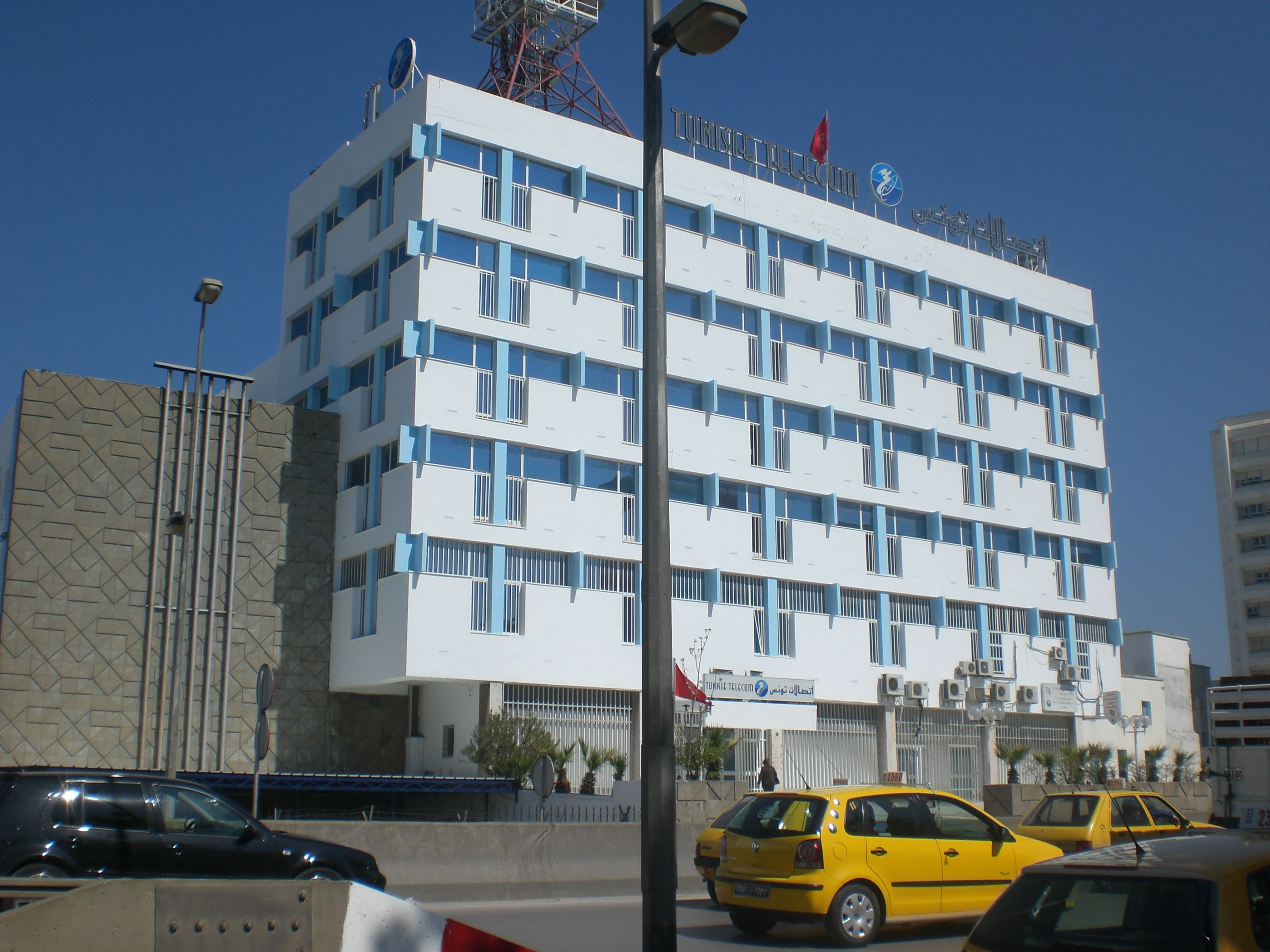 Centrale téléphonique de Tunisie Télécom à Beb Bnet (Tunis)